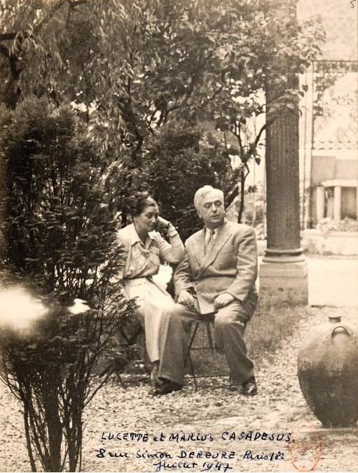 Lucette et Marius Casadesus (1892-1981), 8 rue Simon-Dereure, Paris 18e, juillet 1947.